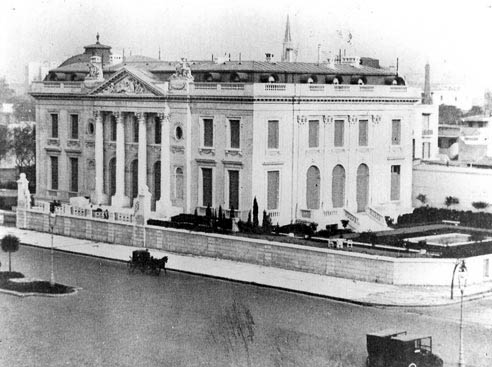 La Residencia Errázuriz Alvear en 1918.